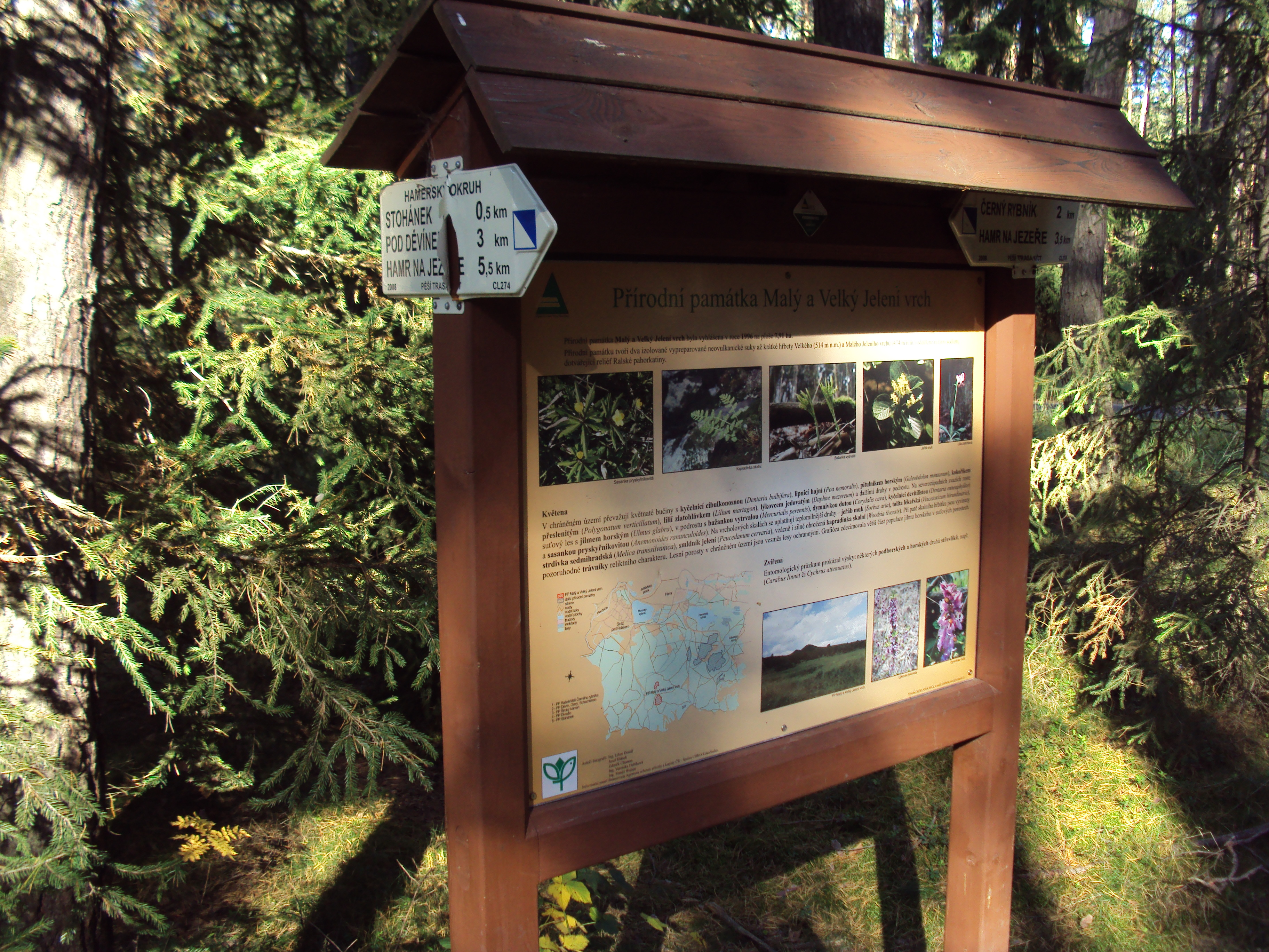 Přírodní památka Malý a Velký Jelení vrch, 3,5 km jižně od Hamr na Jezeře